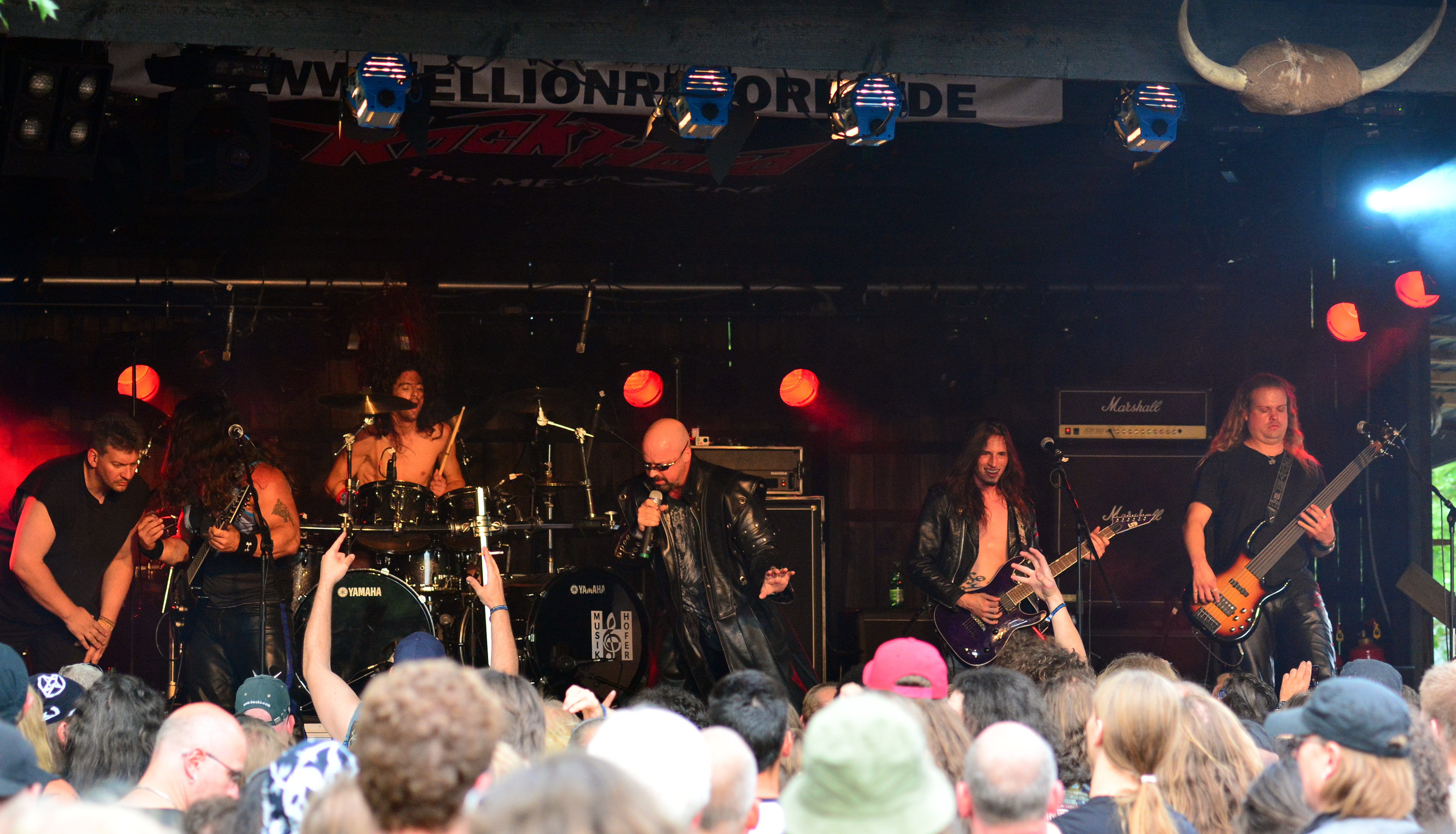 Cage beim Headbangers Open Air 2014